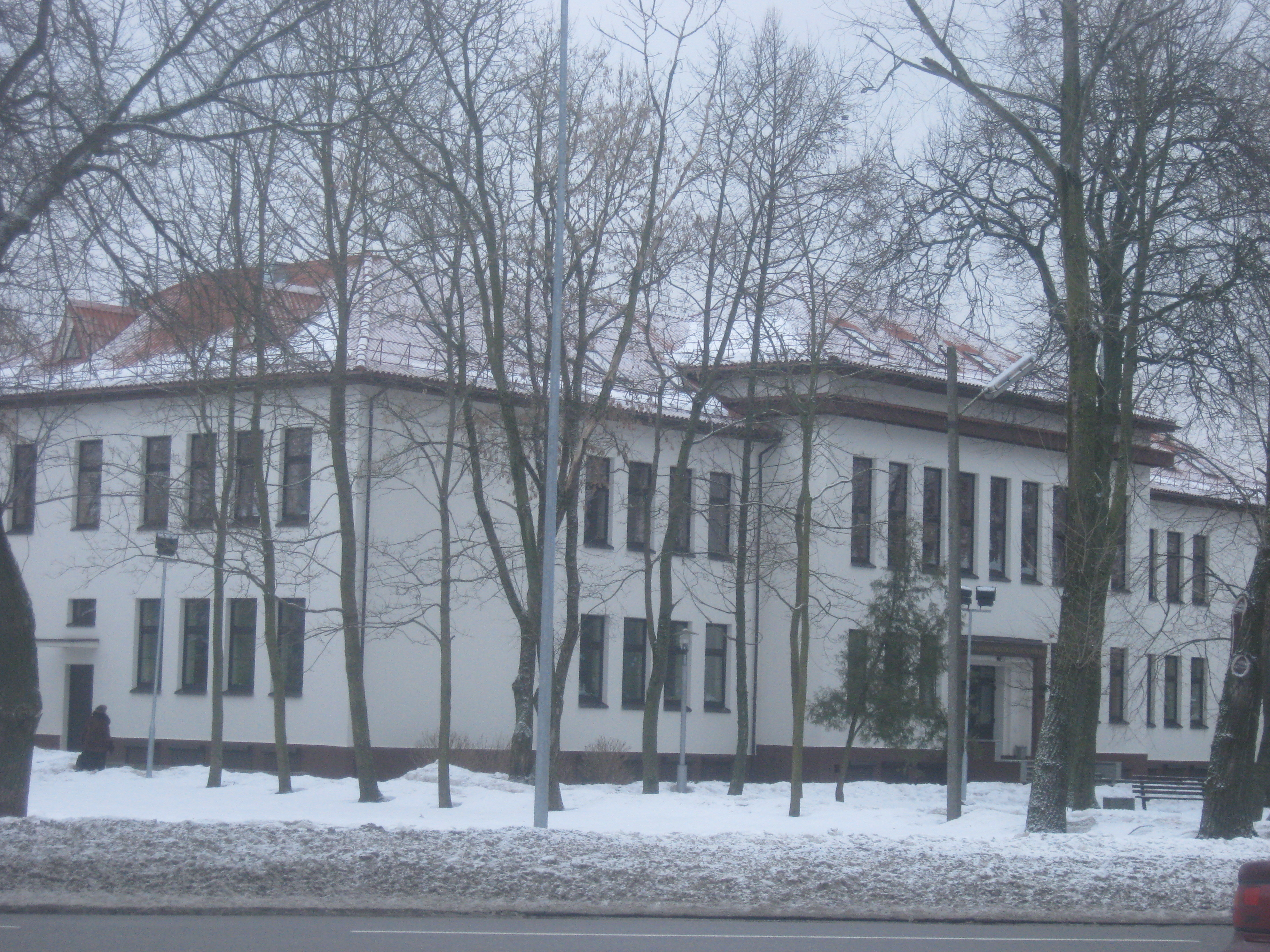 Jonava